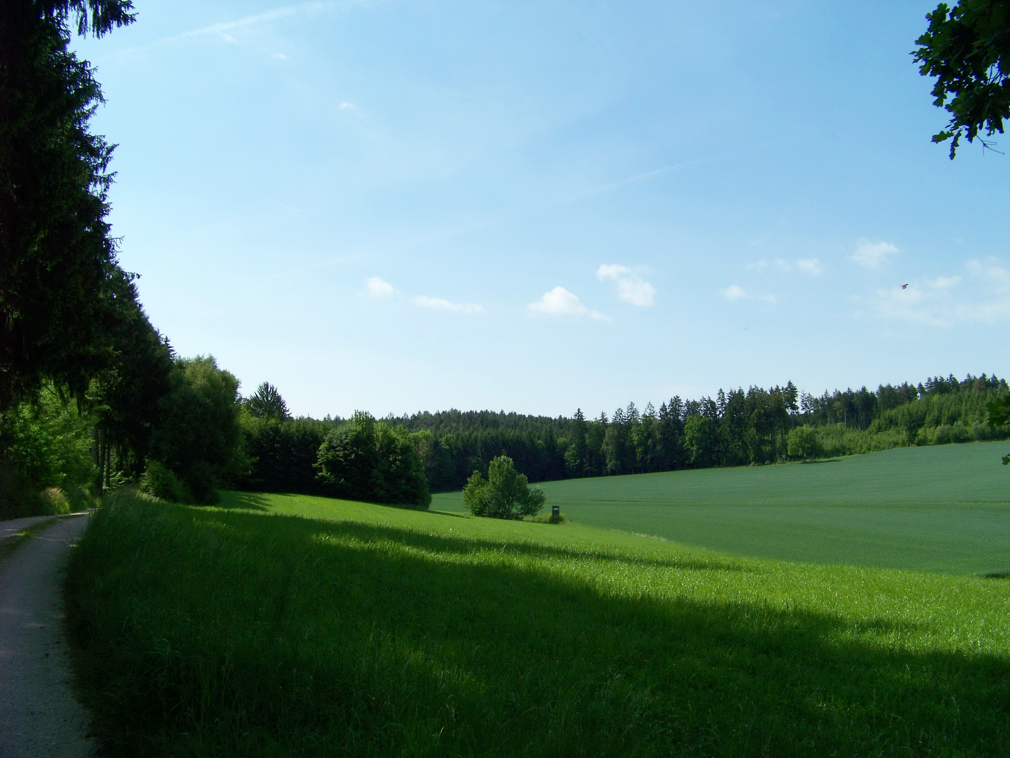 Laberweinting, Hofkirchen. Wiesen, Felder und ausgedehnte Mischwälder am Poschenhof.